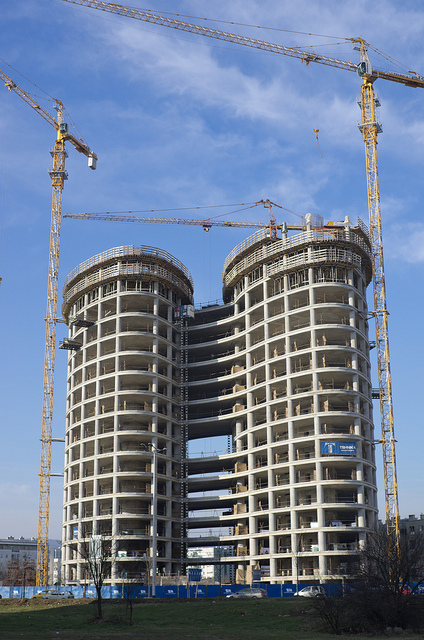 Izgradnja Sky Office Towera